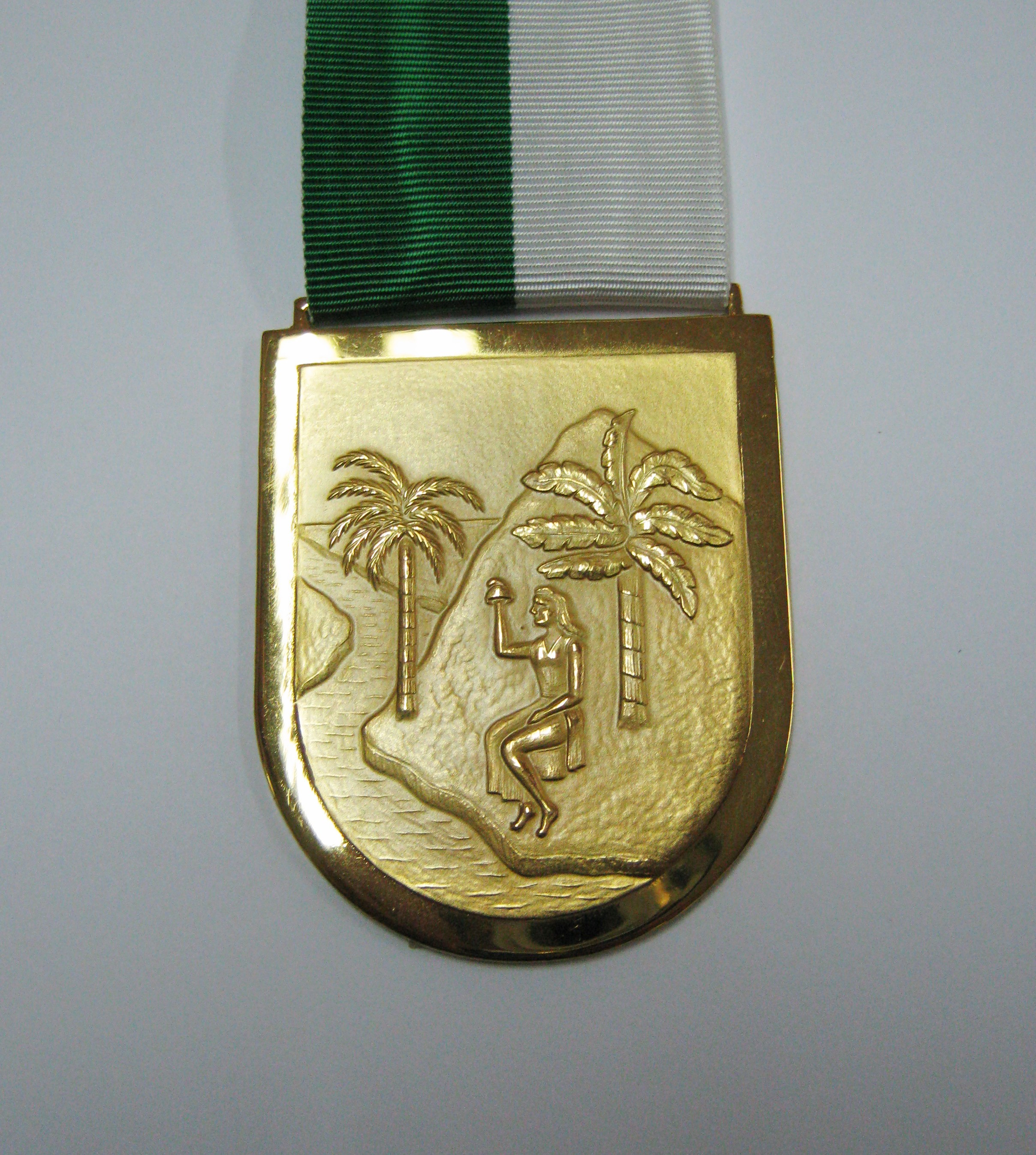 “El Escudo de Antioquia, categoría oro”. Otorgada por la Gobernación de Antioquia a la Biblioteca Pública Piloto por medio del Decreto No. 1660 del 23 de octubre de 2002